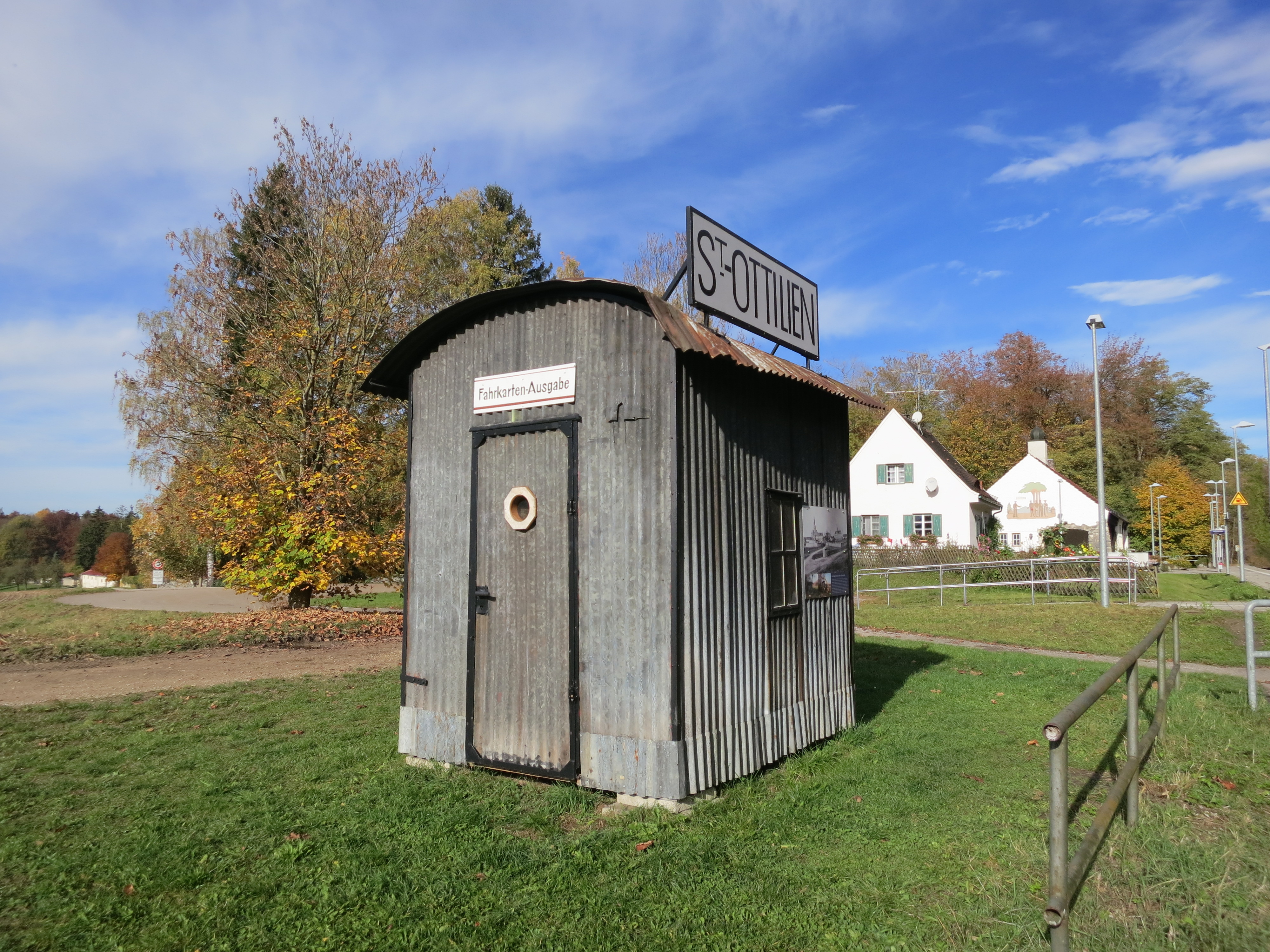 erstes Empfangsgebäude des Bahnhofs St. Ottilien, in Form einer Wellblechhütte